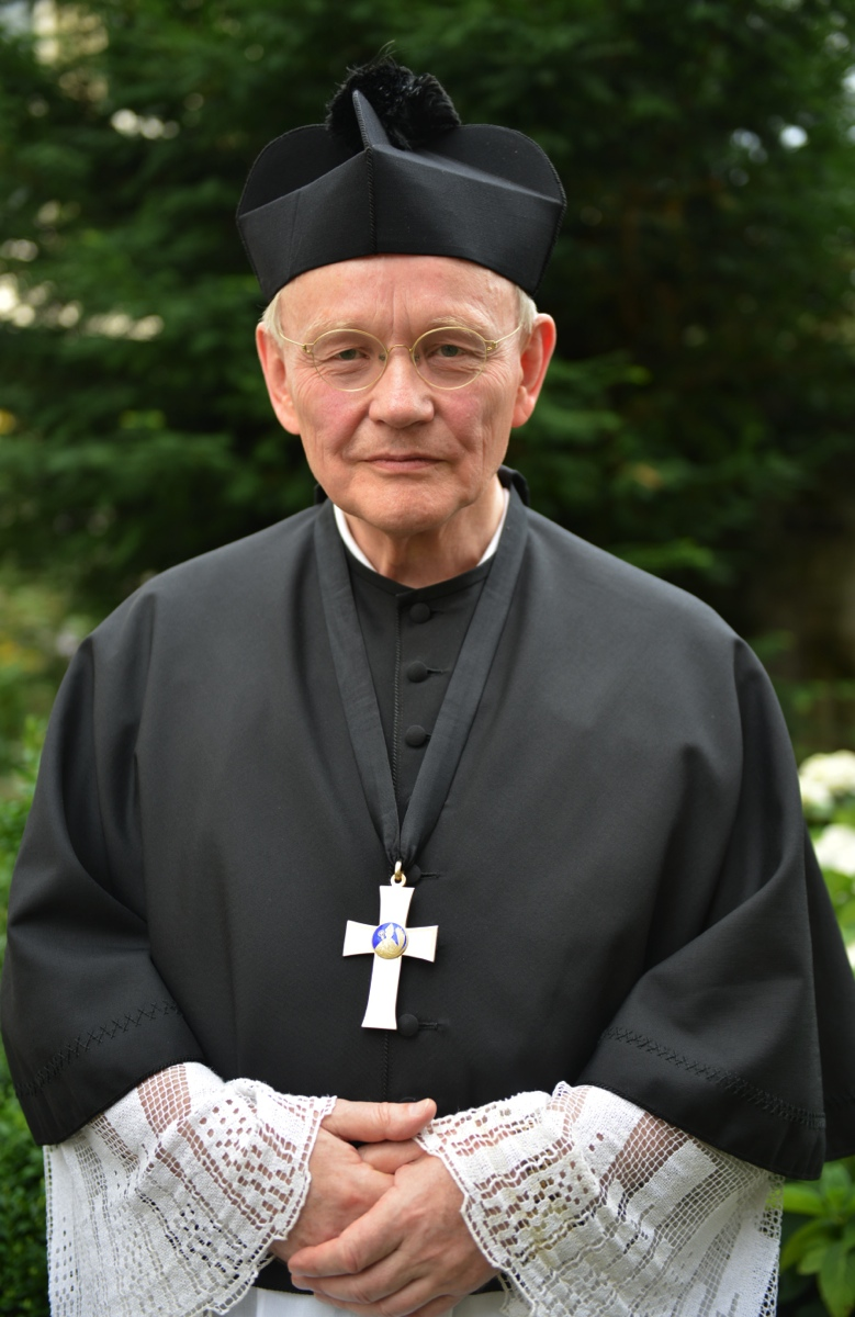 Propst Elmar Nübold hinter der Gaukirche